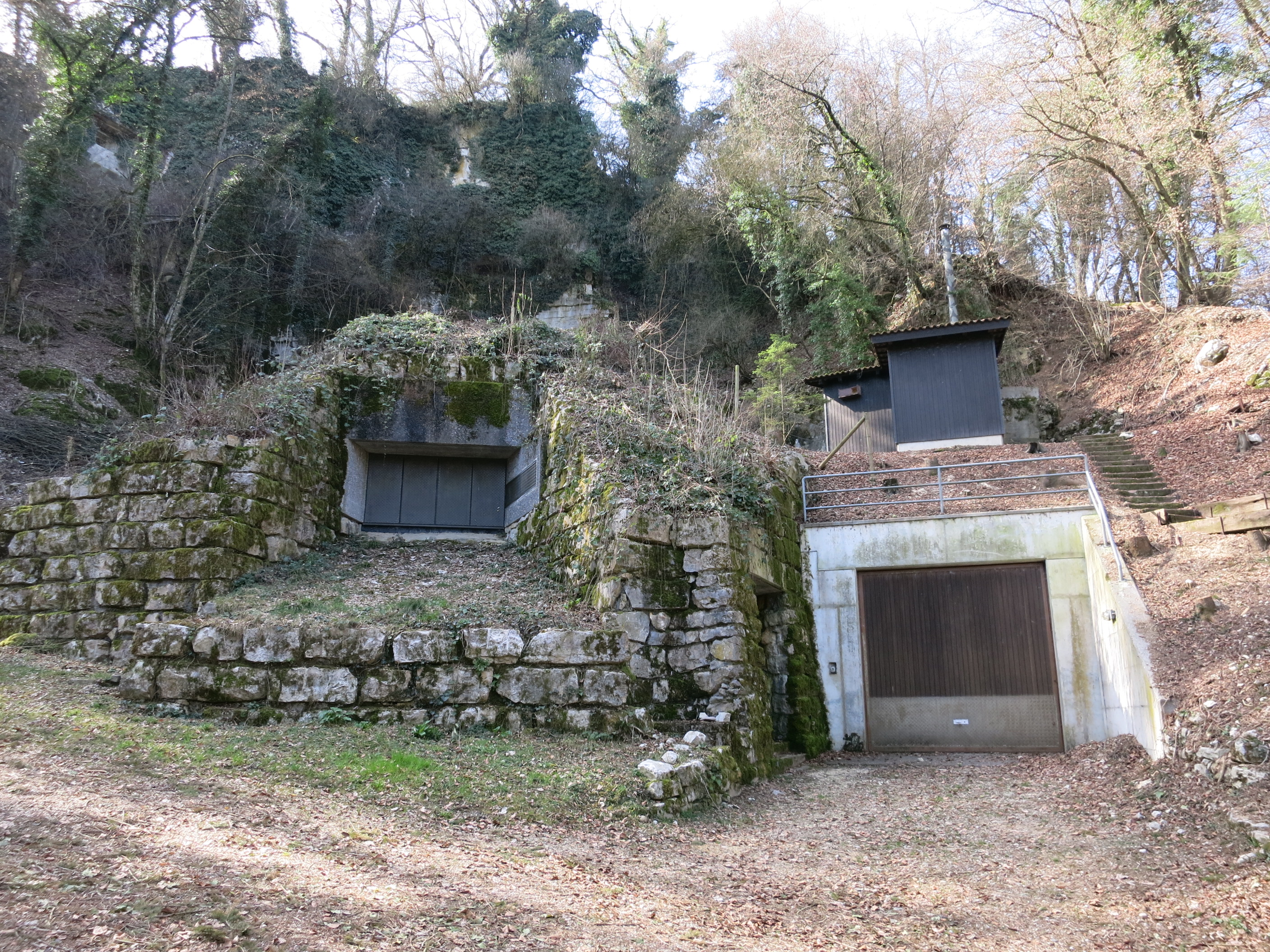 Centurion Bunker (A 3829) und Eingang Artilleriewerk Rein (A 3840)